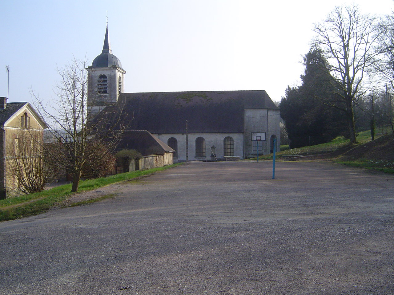 Maraye-en-Othe - L'église au fond du terrain de basket